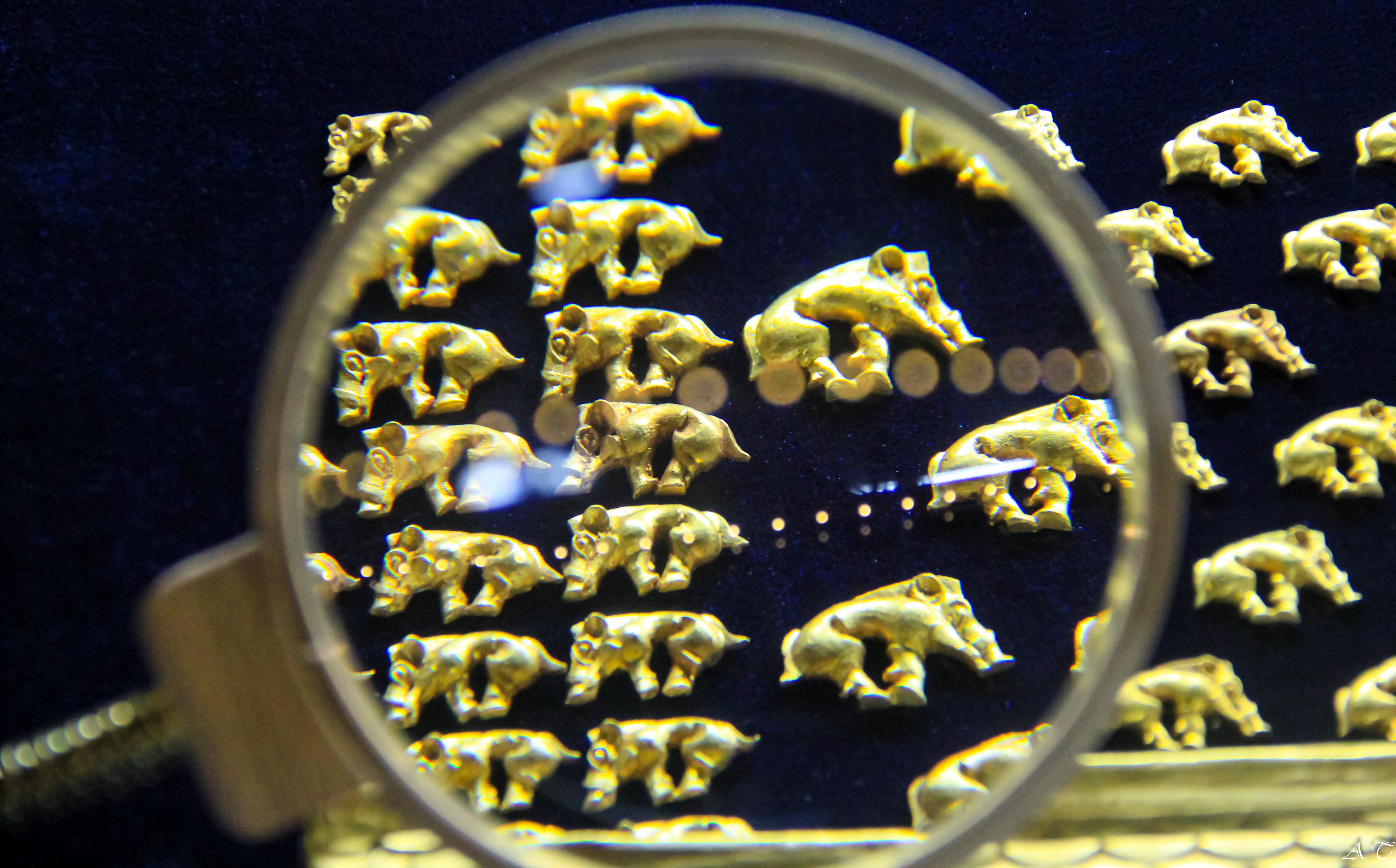 В 2001 году археологи раскопали нетронутую скифскую царскую гробницу Аржаан-2 и тогда представление о древней скифской цивилизации перевернулось полностью. В гробнице нашли 20 килограммов чистого золота, украшения для погребальных обрядов.